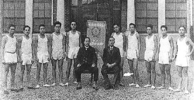 第２回箱根駅伝優勝チームである明治大学競走部メンバー